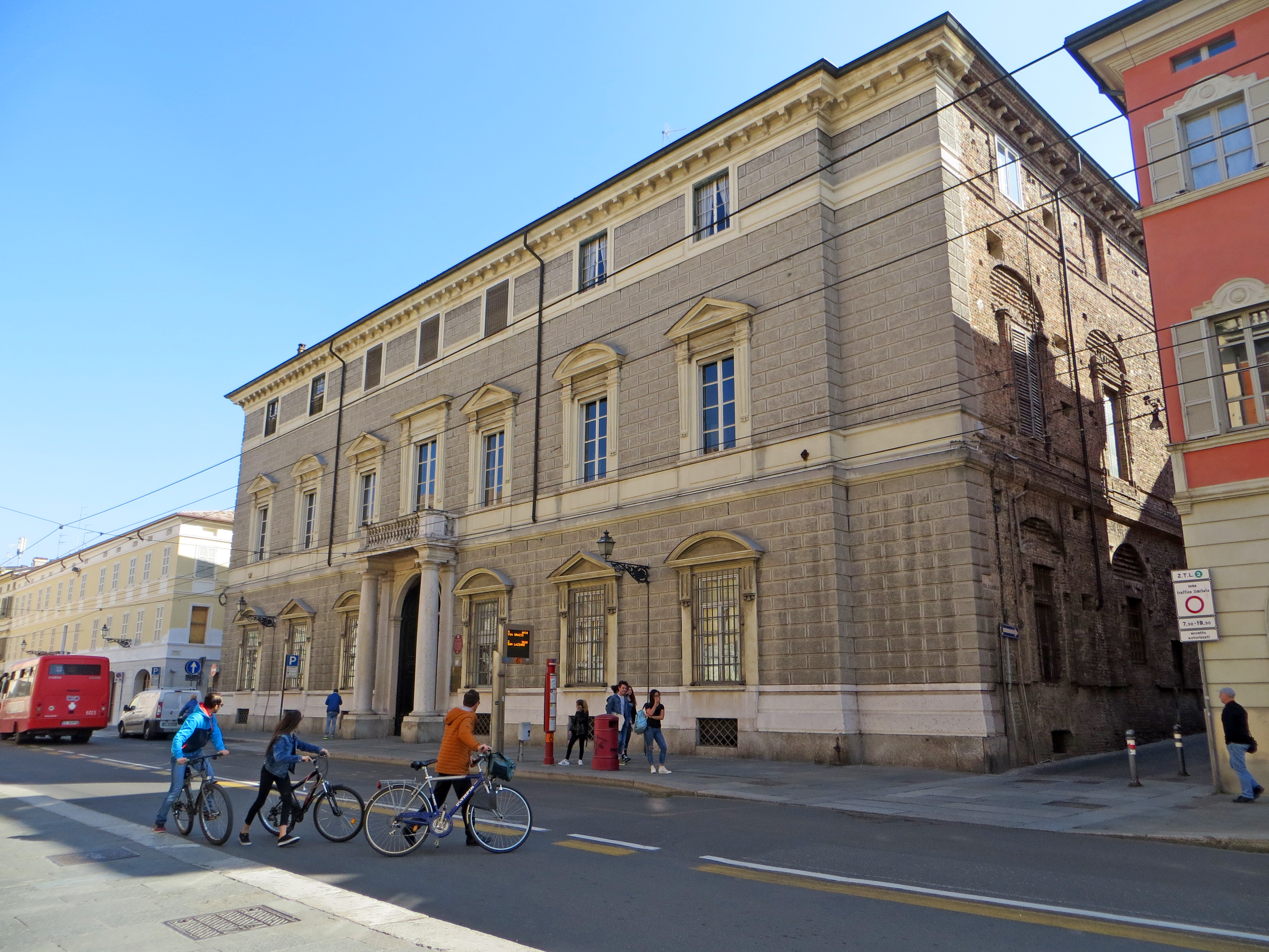 Palazzo Marchi - facciata